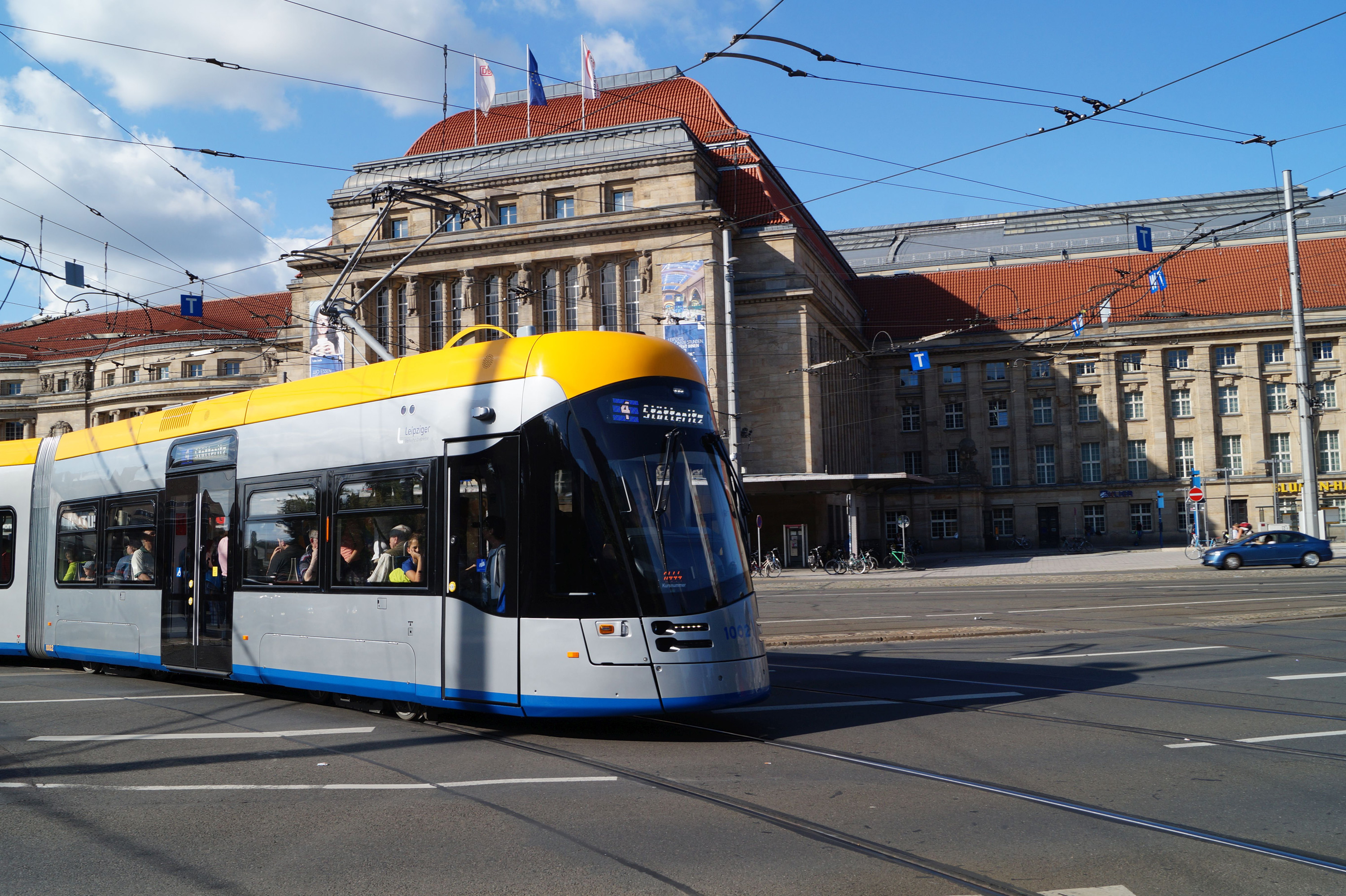 Solaris Tramino NGT10 1002 am Leipziger Hauptbahnhof